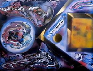 Tableau du peintre français Philippe Guénin.